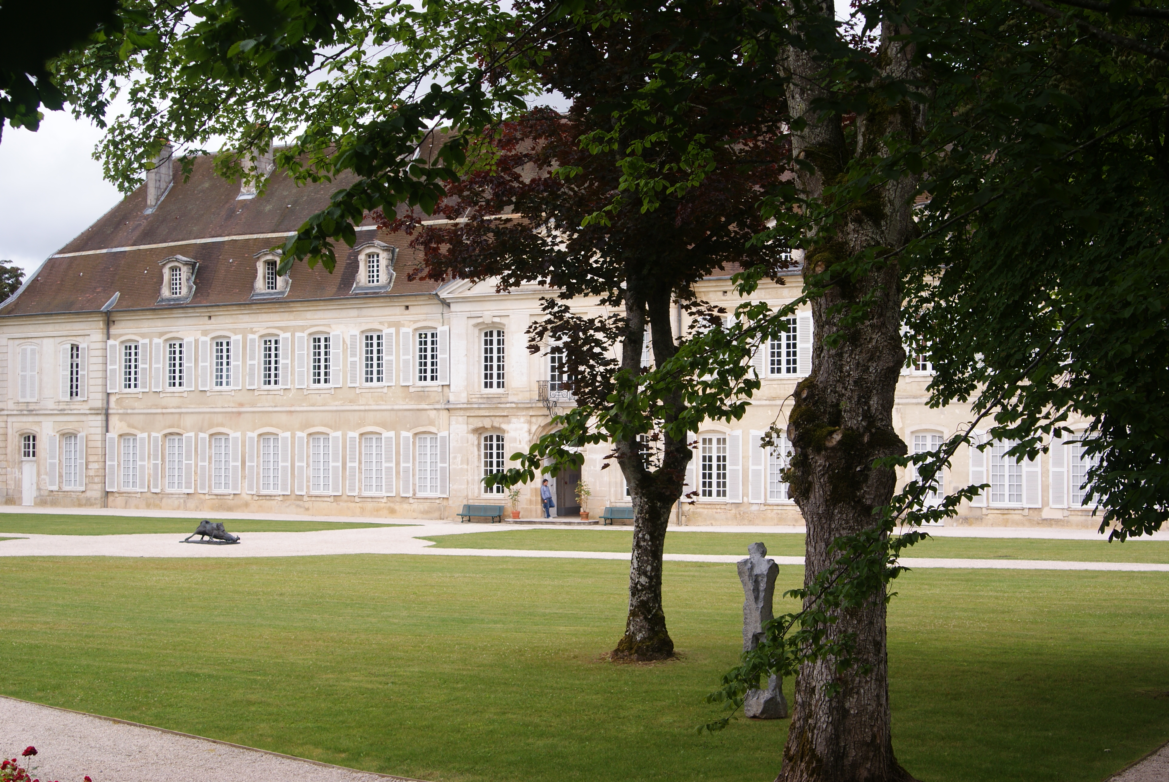 Ancienne abbaye d'Auberive, façade ouest. (Haute-Marne, Champagne-Ardenne).